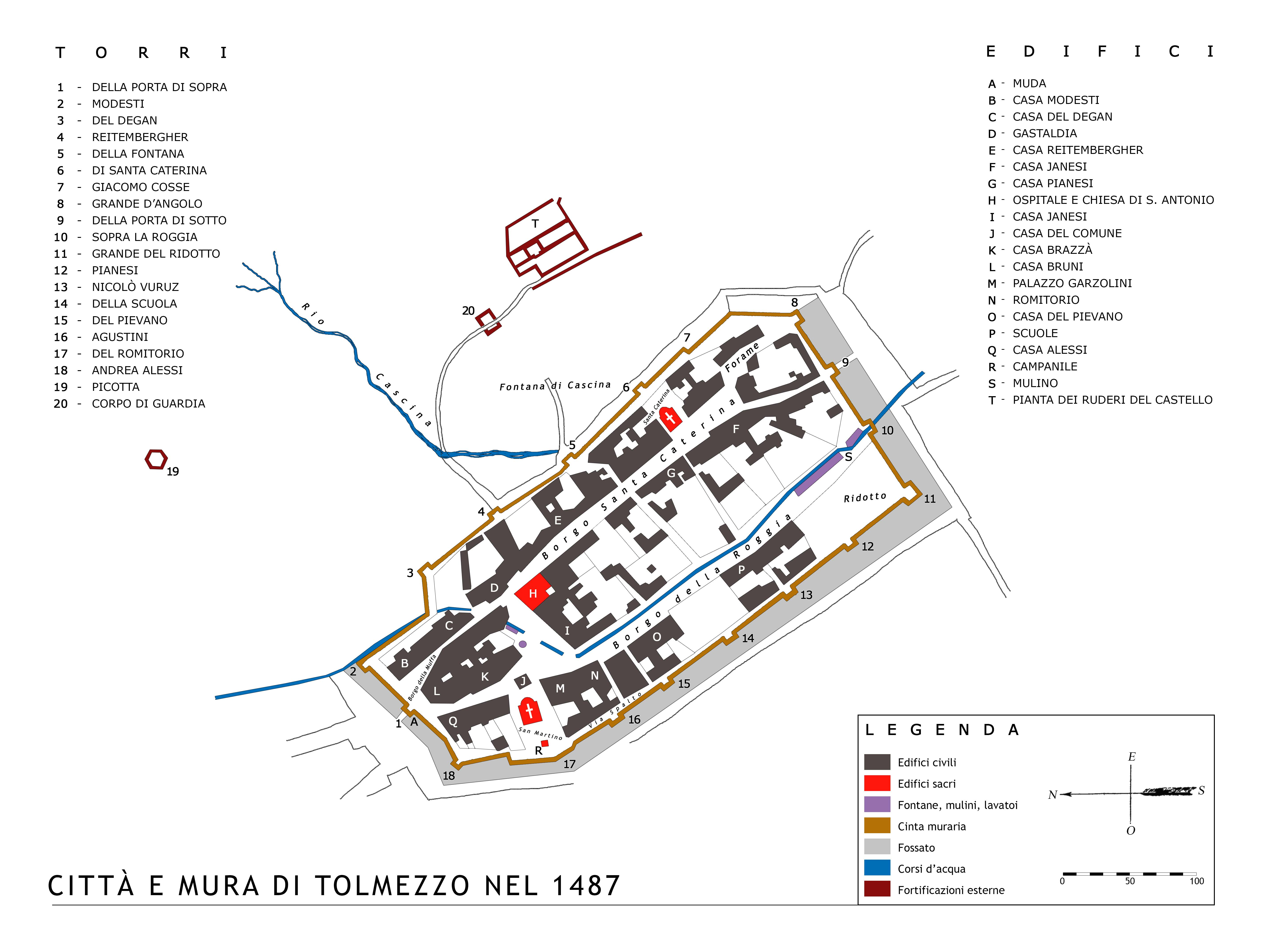 Pianta della città di Tolmezzo nel 1487, rielaborazione del disegno di G. Gortani e G. Marchi.